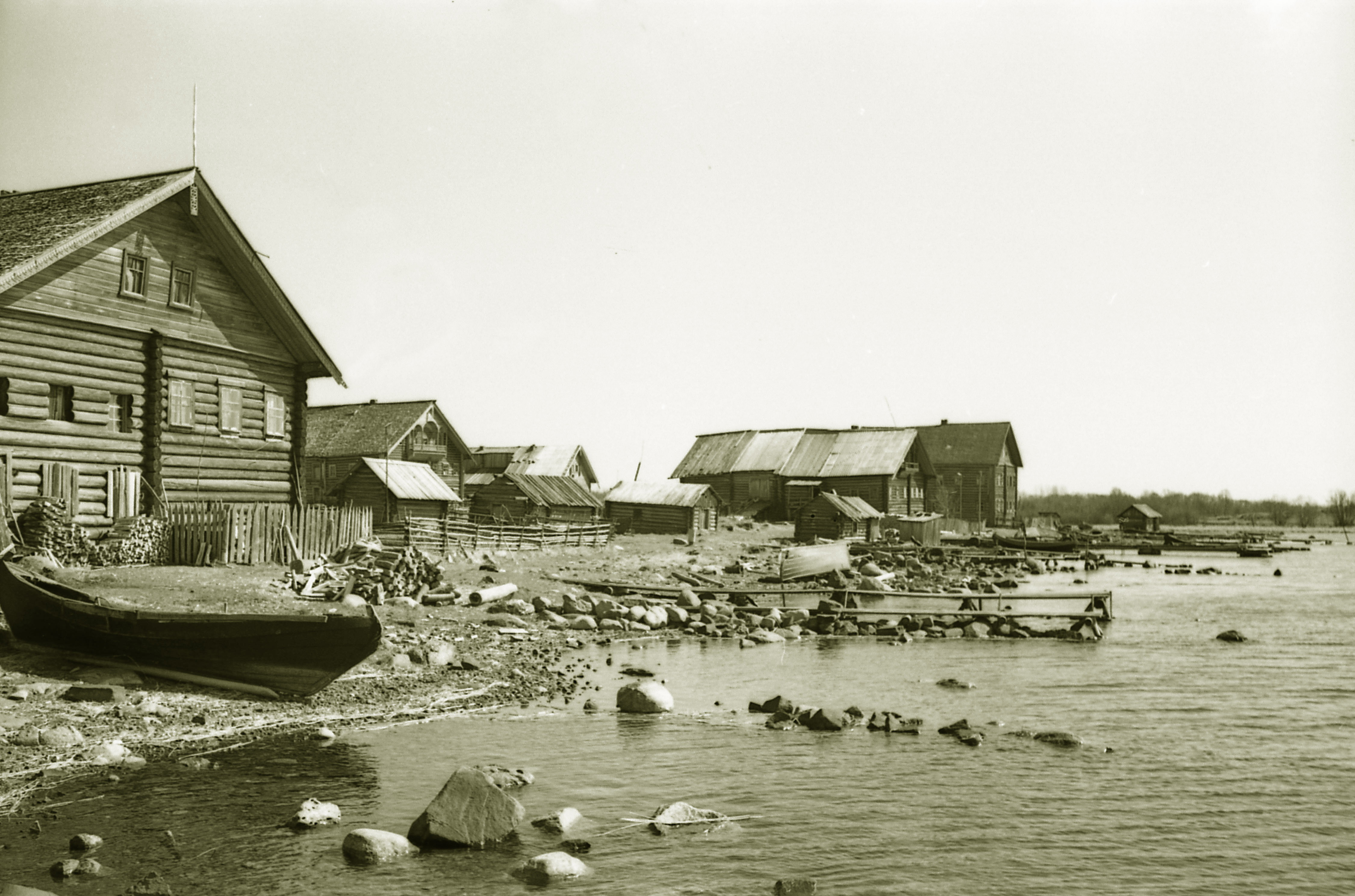 Деревня Сибово: Сибово, Медвежьегорский район, Карелия